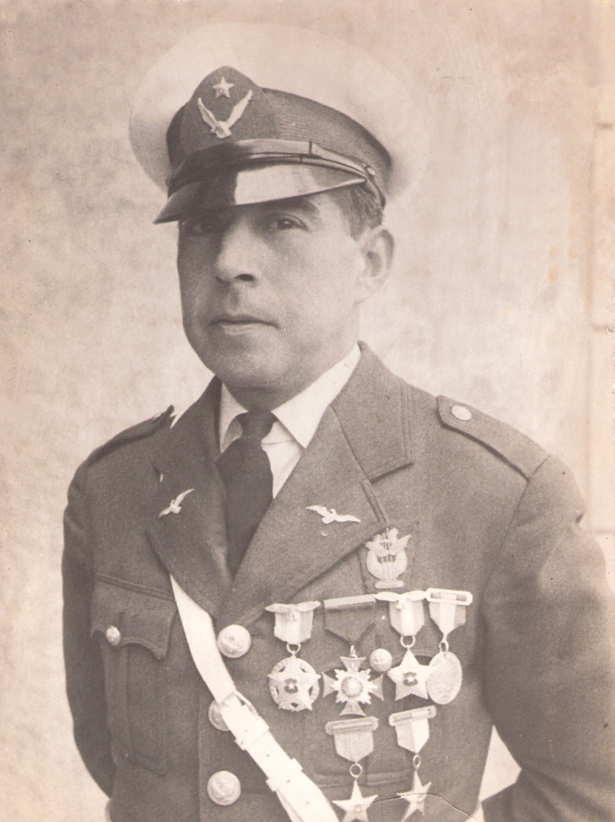 La Banda Instrumental se inicío con tan solo 16 músicos y su primer director fue el Sargento Primero Enrique Pacheco Garcia, quien luego ocupó el puesto de Capitán del servicio de Bandas. ( pausa) Dentro de sus creaciones músicales para la fuerza aérea tenemos la marcha "Gloria a los Héroes" adaptacion de un extracto de la obra "Judas Macabeo" del compositor Alemán Georg Friendrich Händel, siendo la marcha de parada de la Escuela de Aviación. (pausa) Además el capitán Pacheco es el autor musical del Himno de esta escuela formadora de oficiales aviadores.